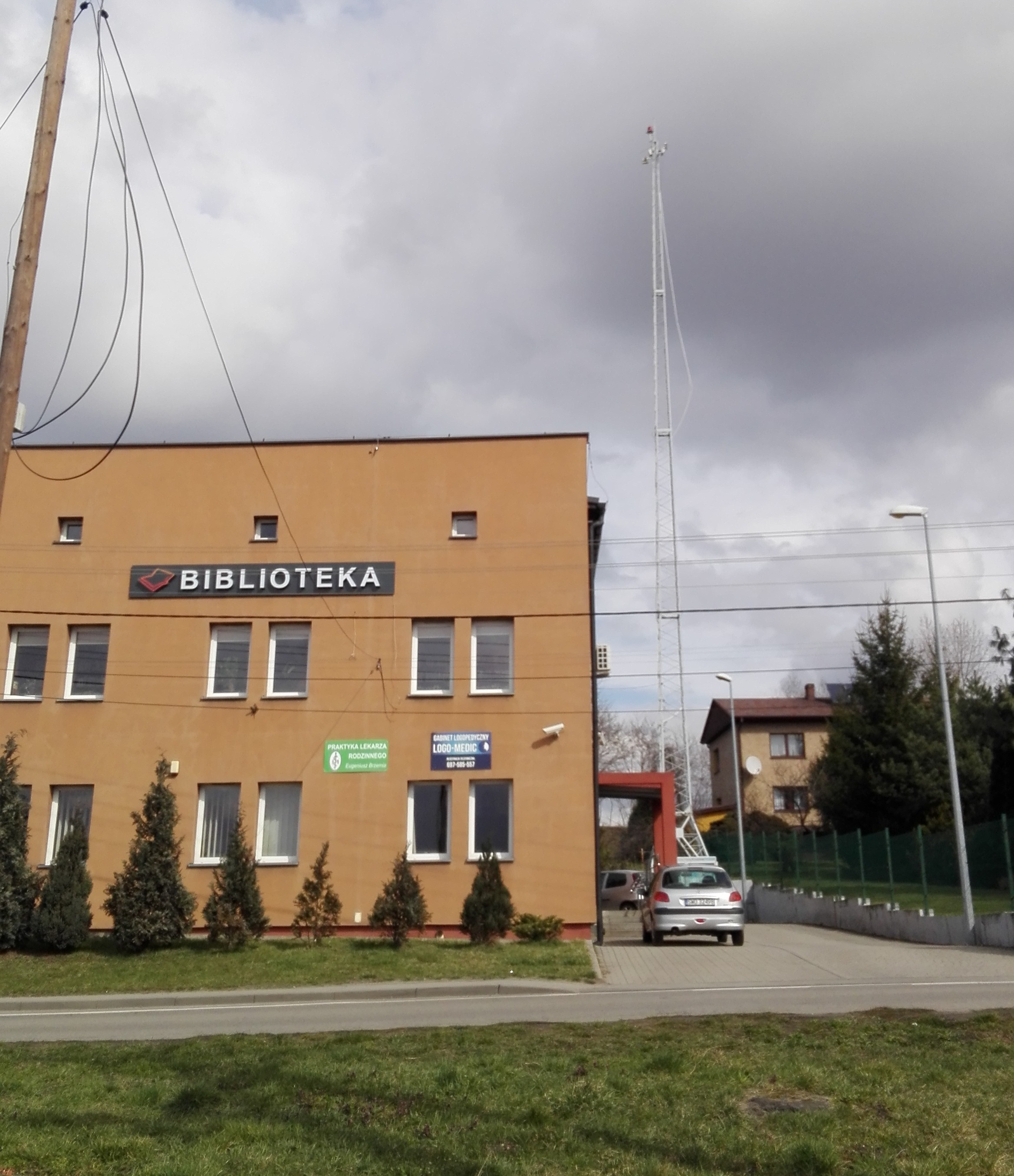 Godów, Gminna Biblioteka Publiczna. Dawniej Strażnica Wojsk Ochrony Pogranicza (WOP), następnie Straży Granicznej (SG).